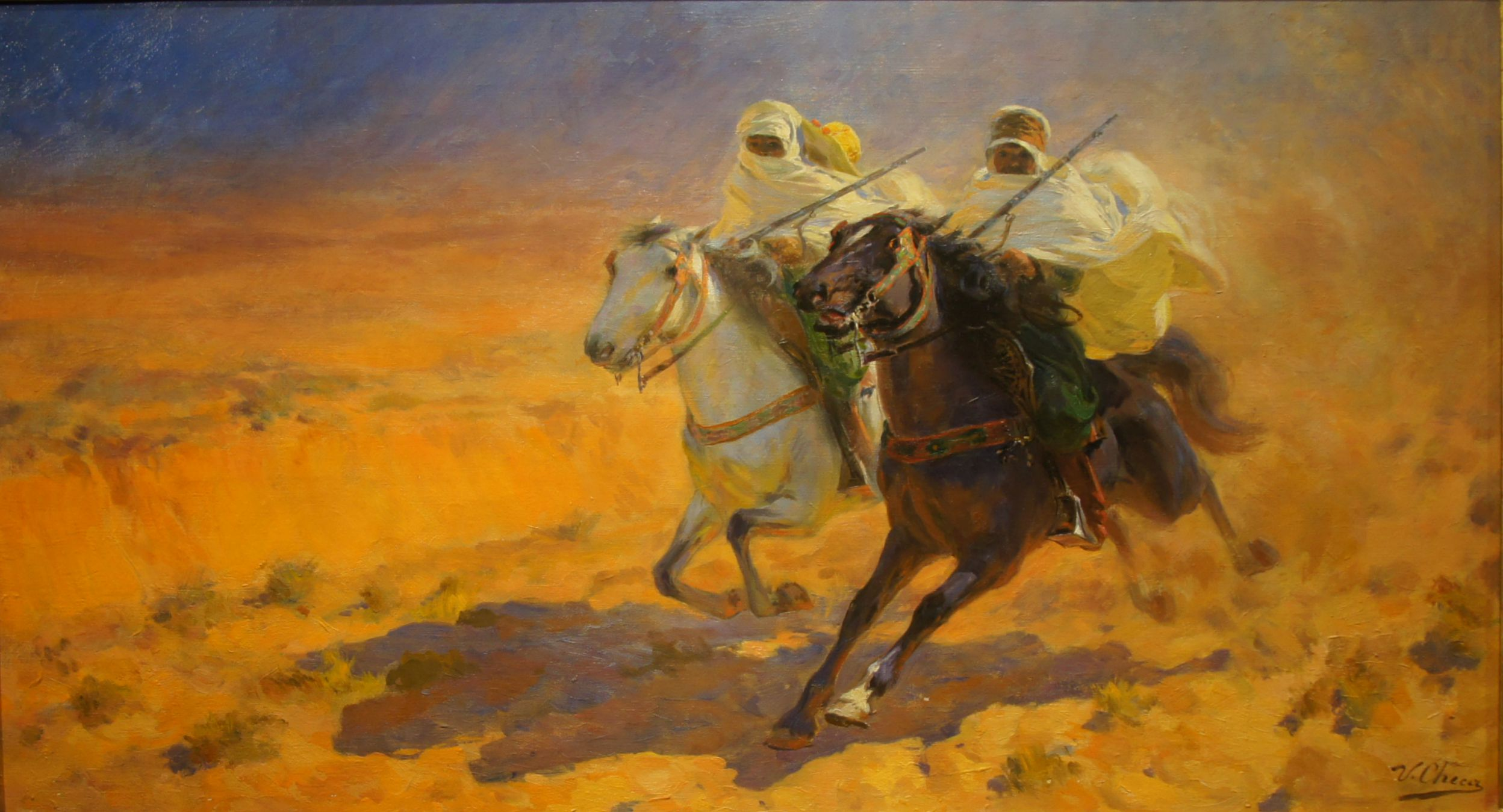 Entre dos oasis, óleo sobre lienzo, 55 x 100 cm. Salón oficial de París. 1911. Firmado ángulo inferior derecho. Depósito colección particular.